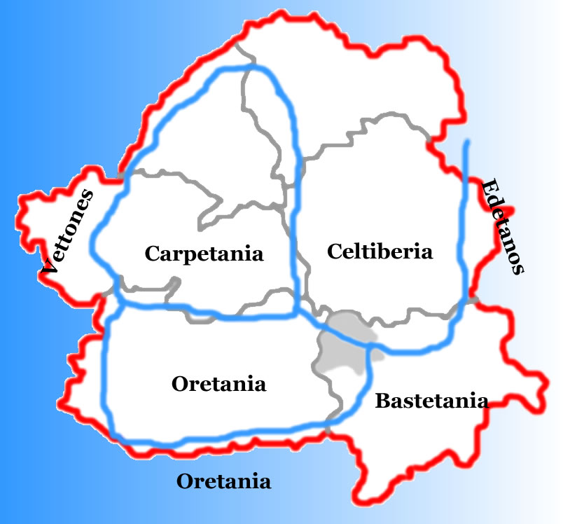 El Término de Villarrobledo en relación con la extensión de los Pueblos Prerromanos.